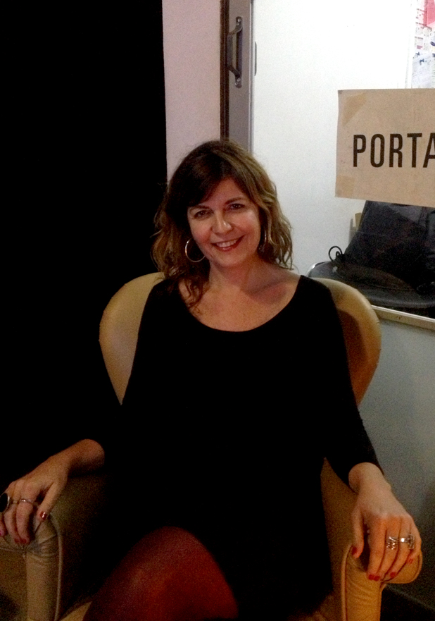 Veronica Pallini posando en Porta4